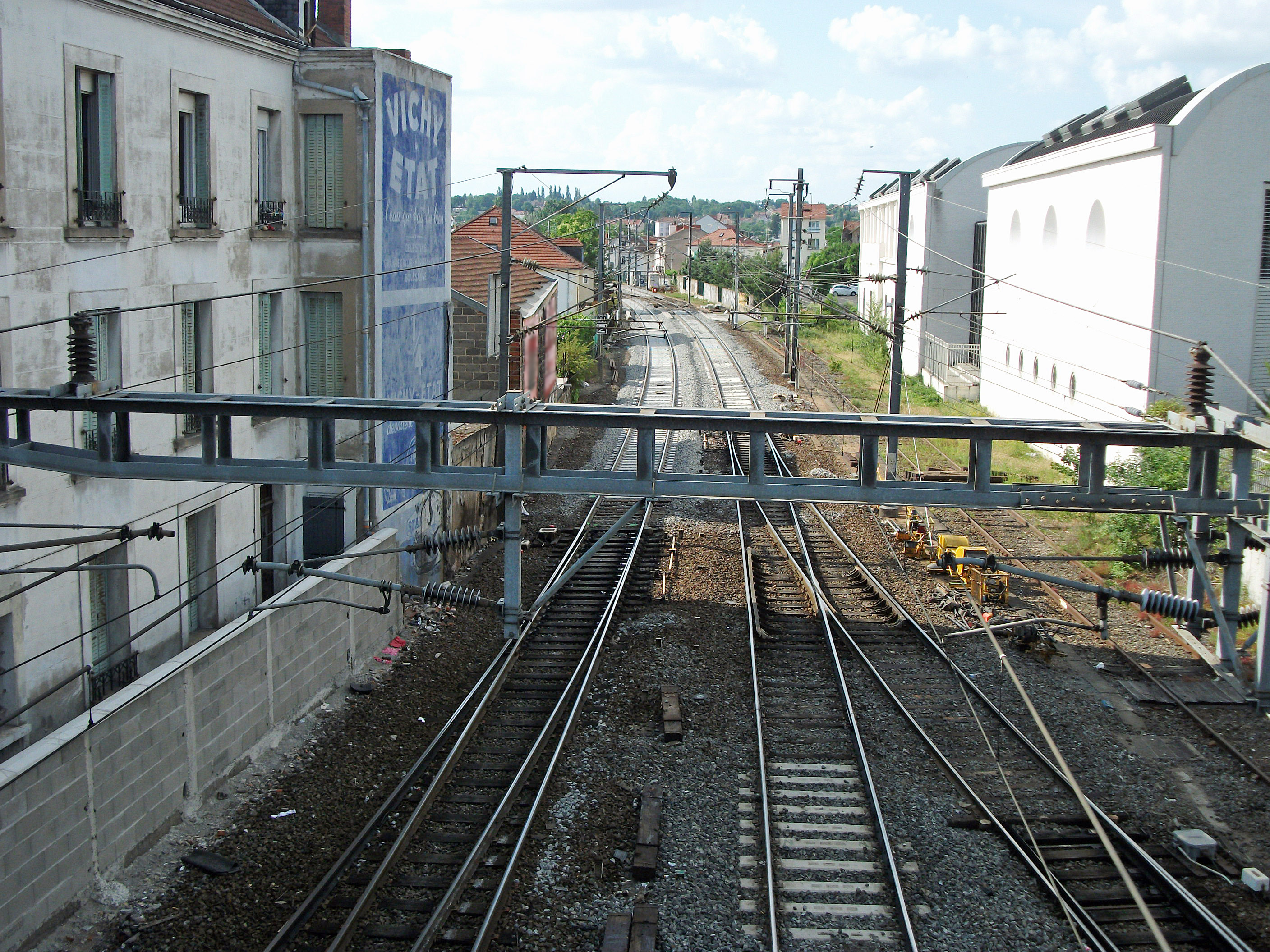 Sortie nord de la gare de Vichy. Les voies, rénovées en 2014 dans le cadre d'une opération de maintenance nocturne, sont vues en direction de Saint-Germain-des-Fossés, Paris et Lyon. A droite, on aperçoit les bâtiments de l'Atrium, actuel hôtel d'entreprises de l'agglomération de Vichy et ancien bâtiment de la compagnie fermière qui avait alors son propre embranchement ferroviaire.